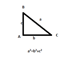 नेपाली: पाइथागोरस साध्य